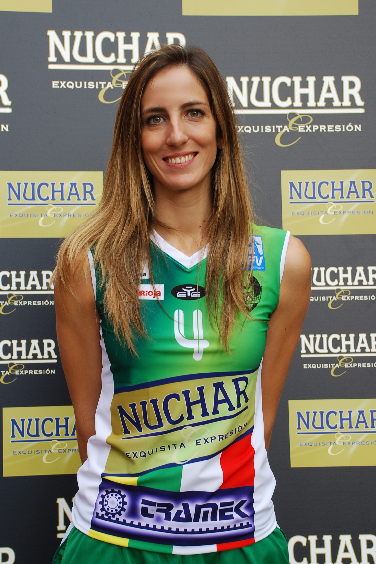 Elena Esteban, jugadora de voleibol española.